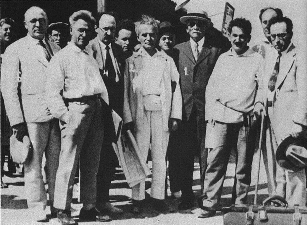 יצחק יציב, ברל כצנלסון, אייב קאהן, דוד בן-גוריון, זלמן רובשוב, אברהם הרצפלד, בביקורו של קאהן בארץ ב-1925